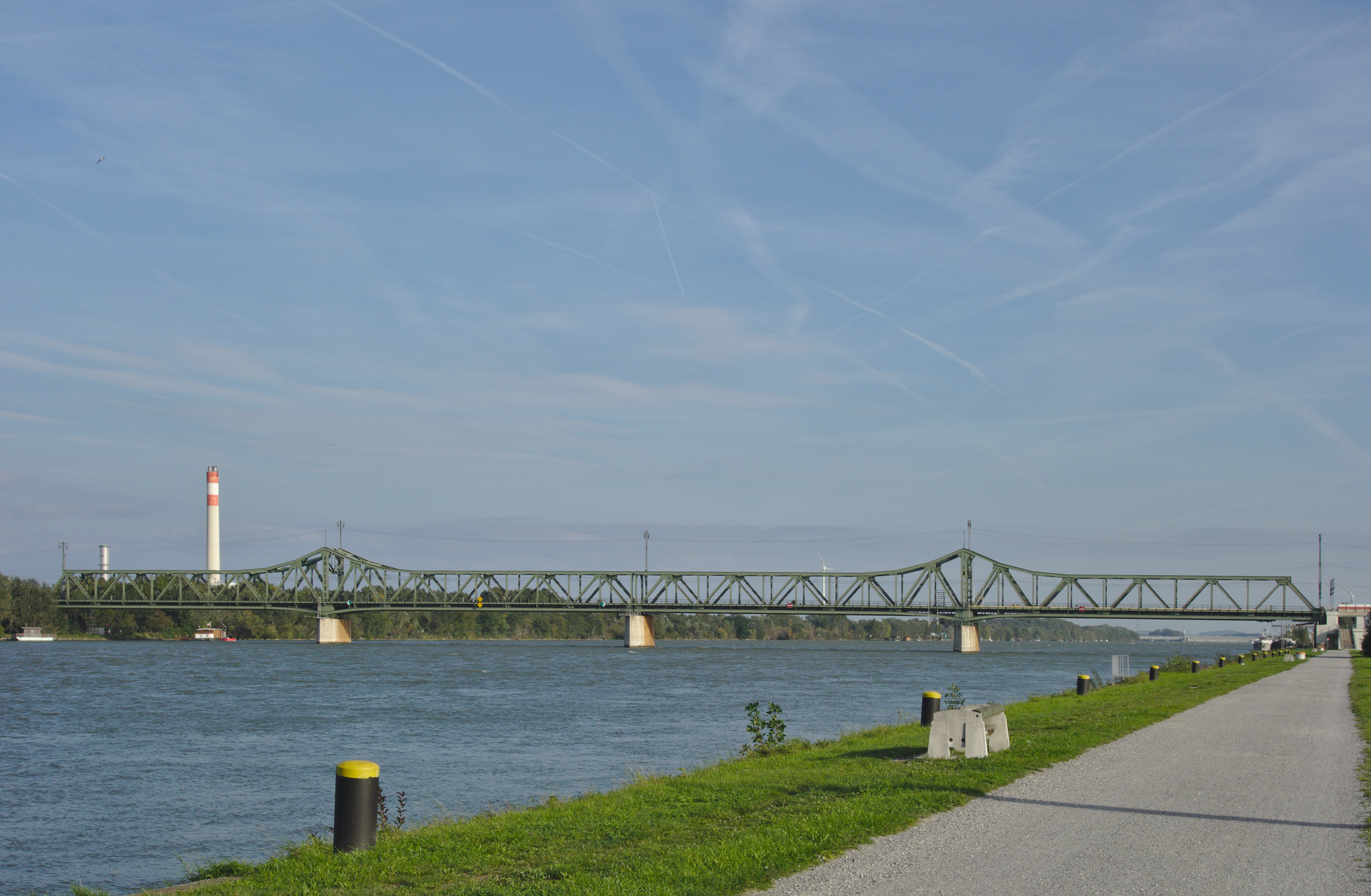 Stadlauer Donaubrücke der Ostbahn